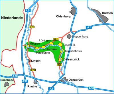 Lage des Hasetals und Verlauf des Flusses Hase